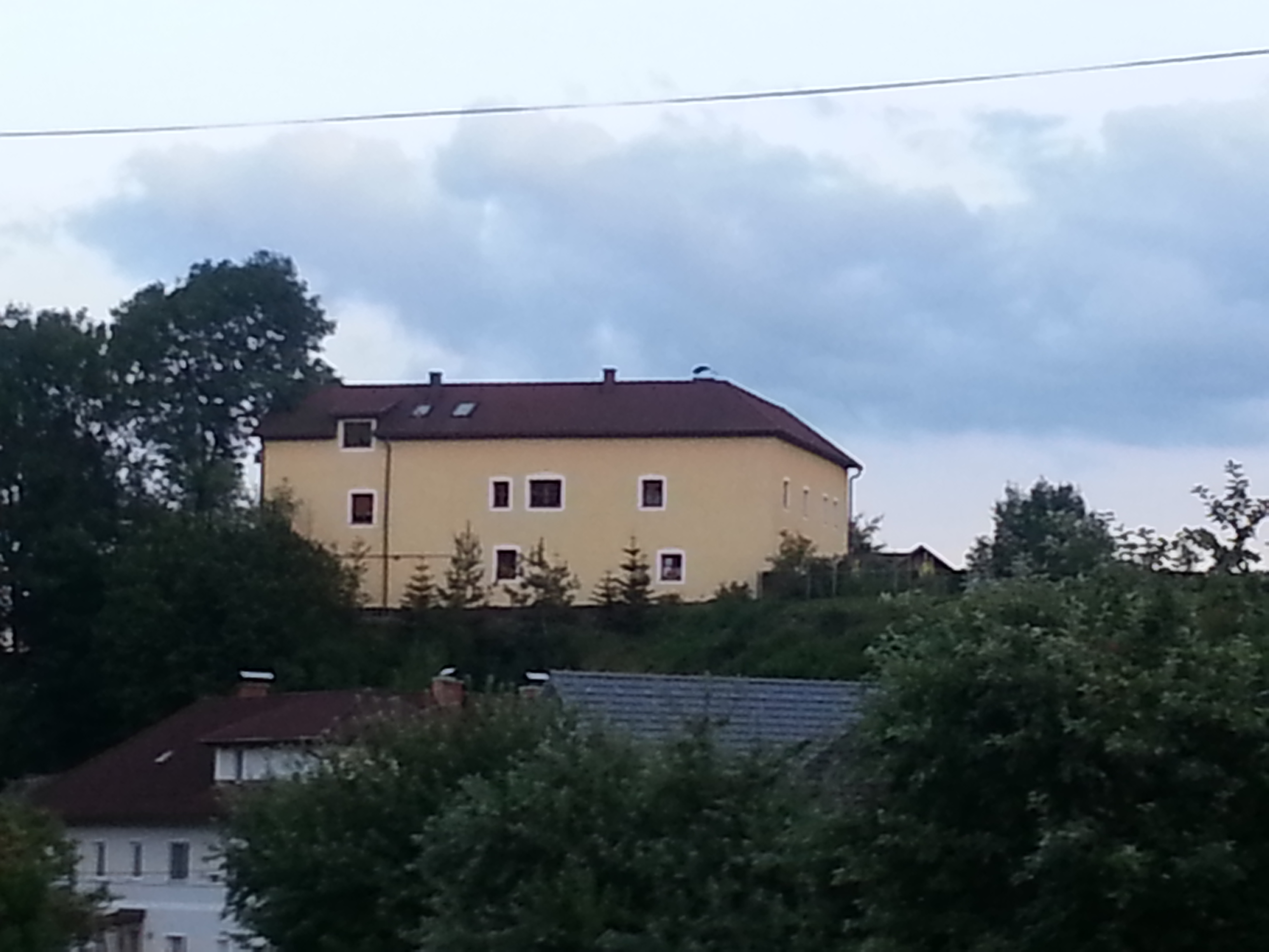 Nordansicht des Schlosses.